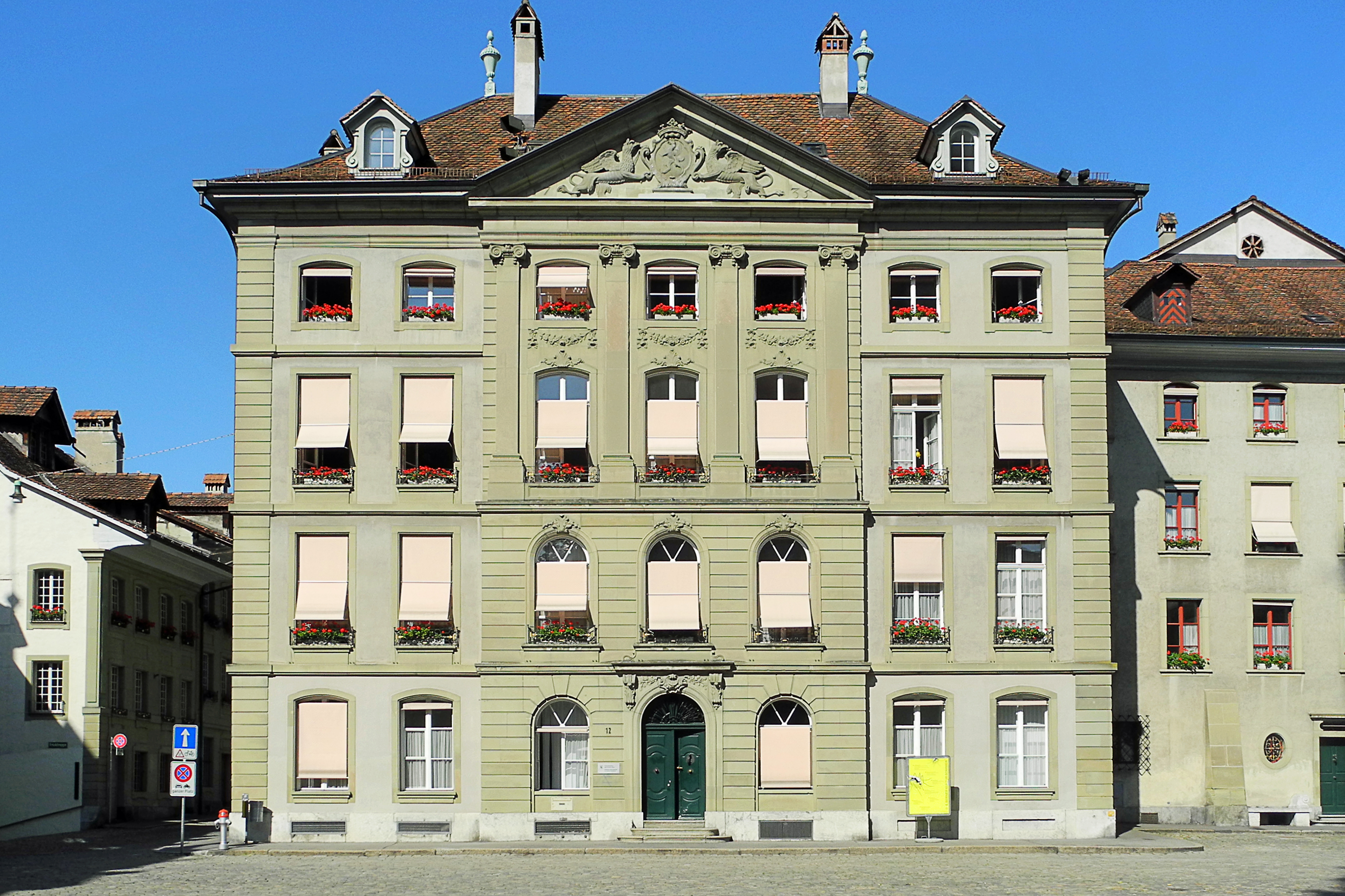 Haus Münsterplatz 12, Tscharnerhaus